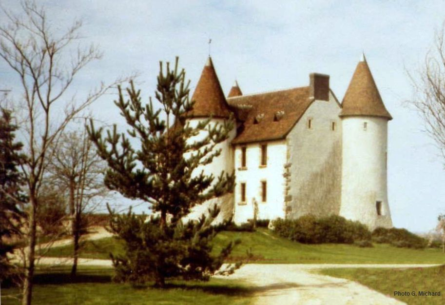 vue du château d'Ancinay à Doyet (Allier) - photo prise en 1982